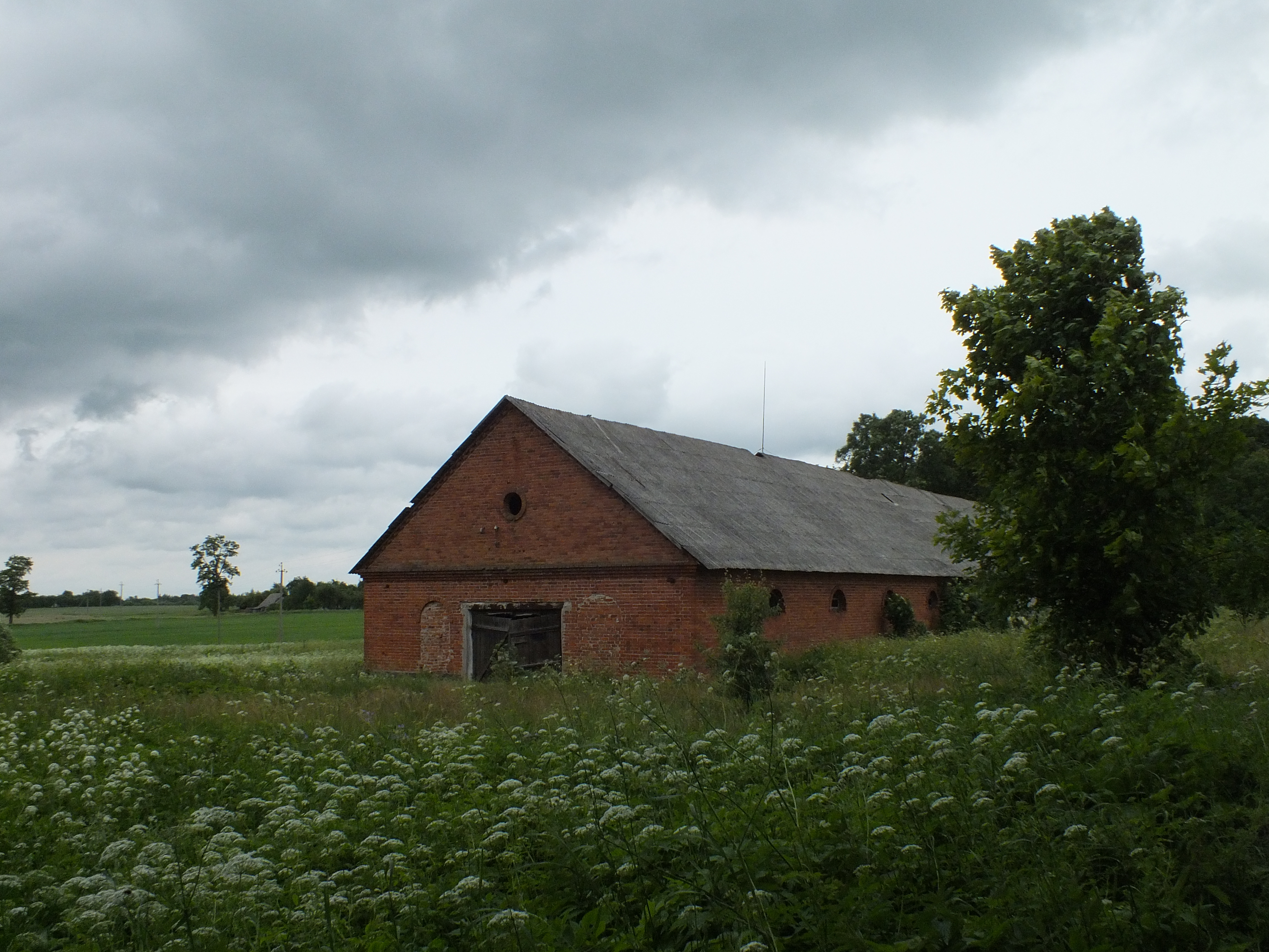 Gelvonų dvaro tvartas